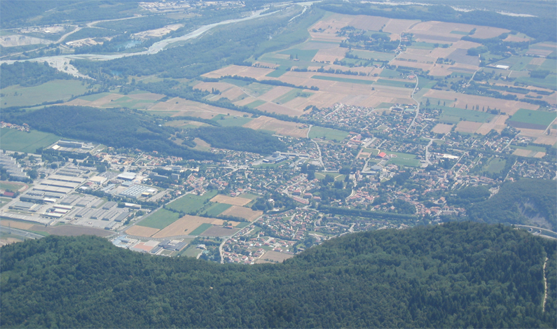 Photo de Varces-Allières-et-Risset vue du Pic St Michel.